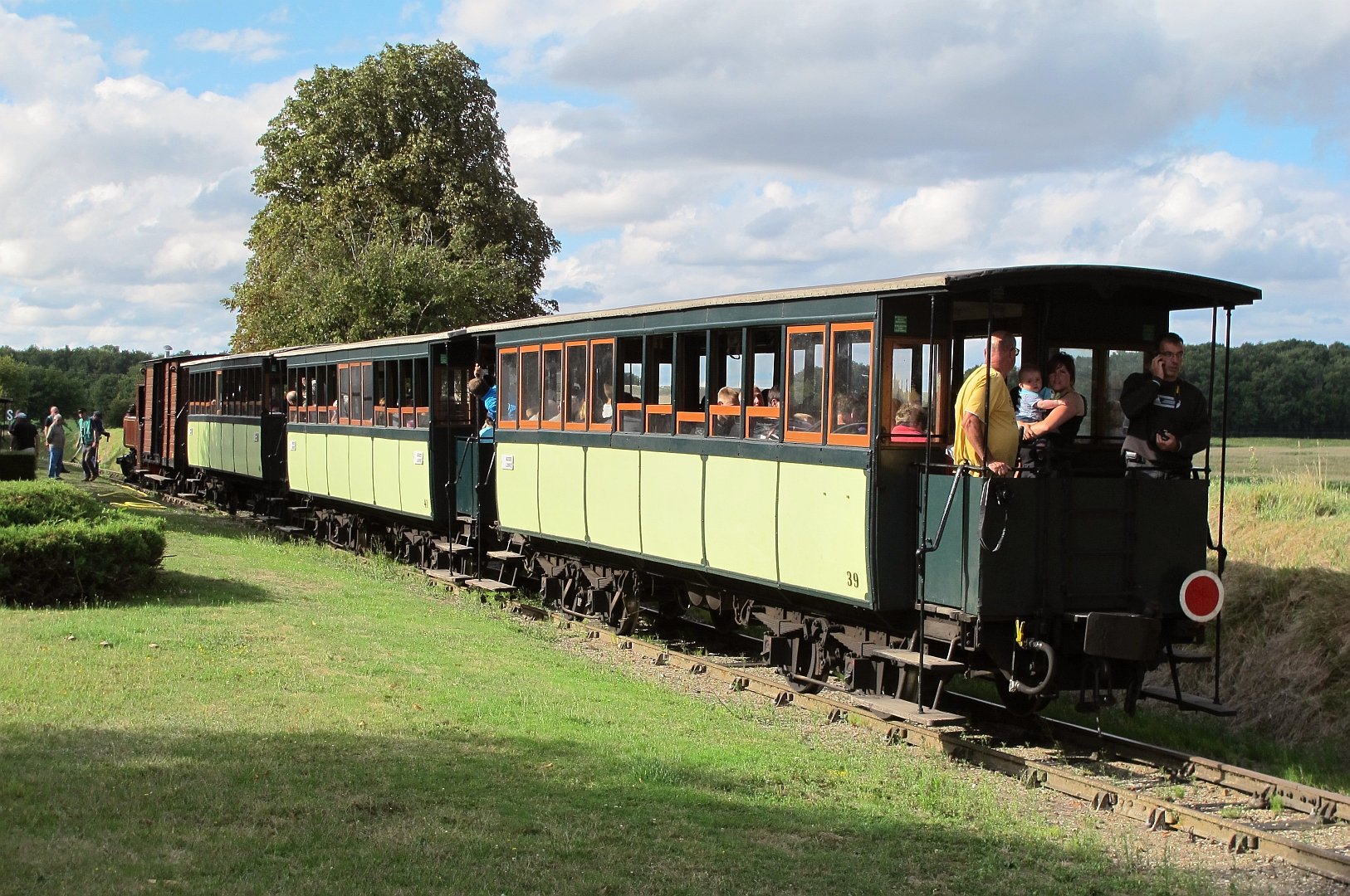 Un train du TBB en gare d'Heugnes (Indre) le 23 août 2015.